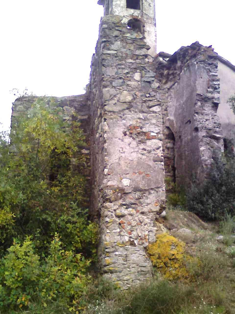 Mura perimetrali chiesa Maria Maddalena in Ellera (Albisola Superiore - Italy)